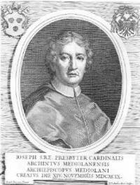 Ritratto del Cardinale Giuseppe Archinto, arcivescovo di Milano.